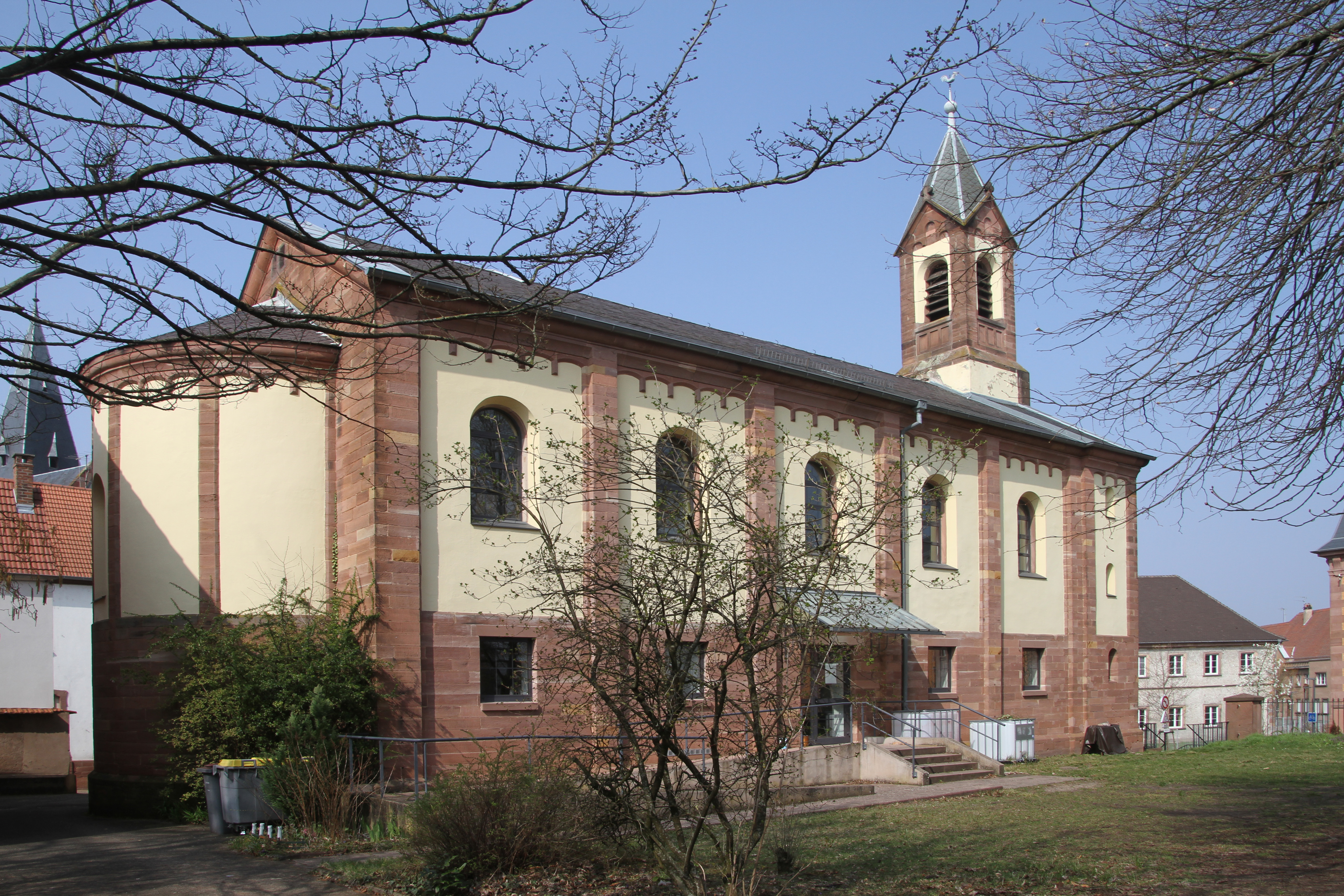 Hagenau